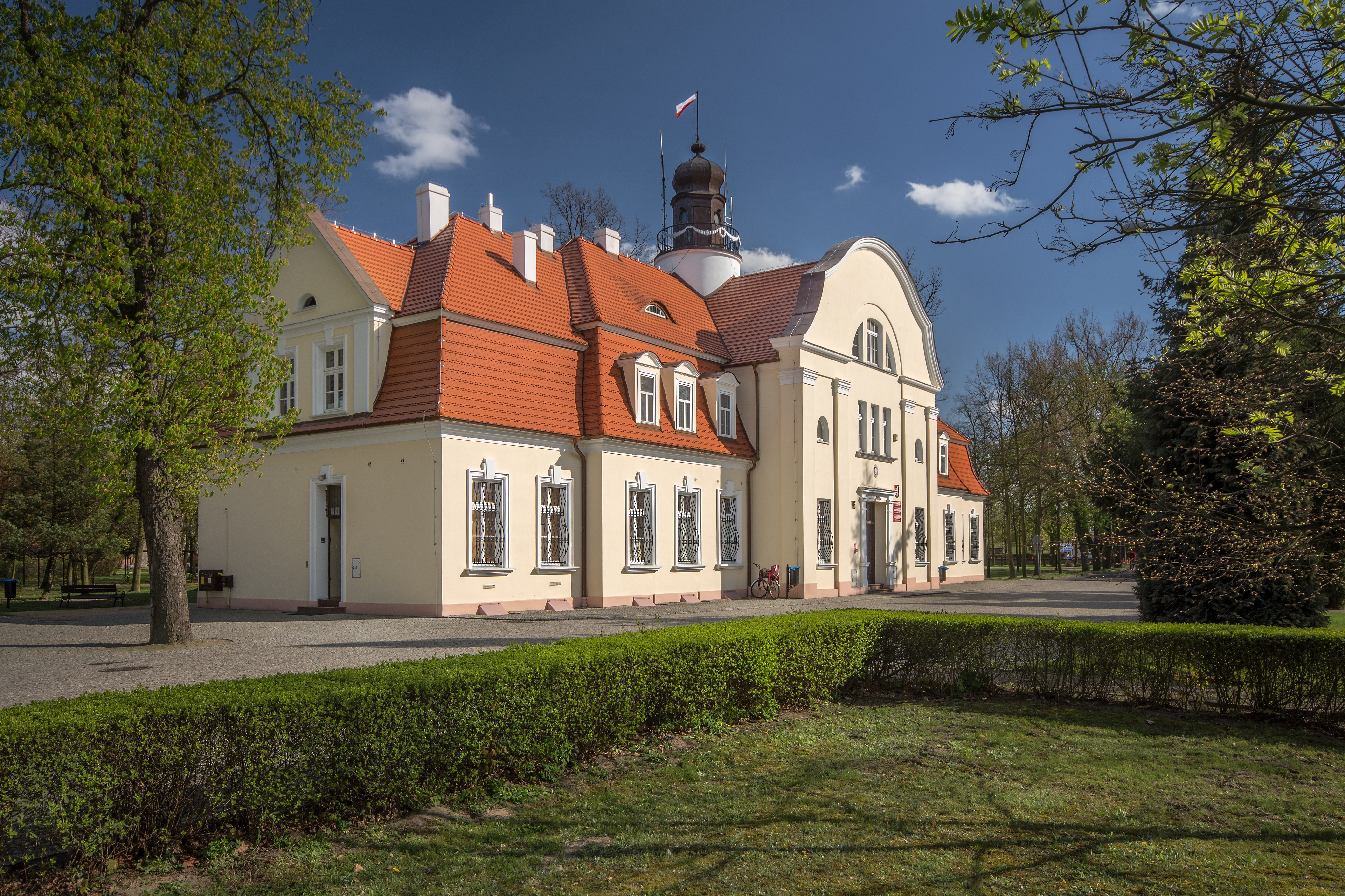 Grabów nad Prosną, dwór, XVIII/XIX, 1908